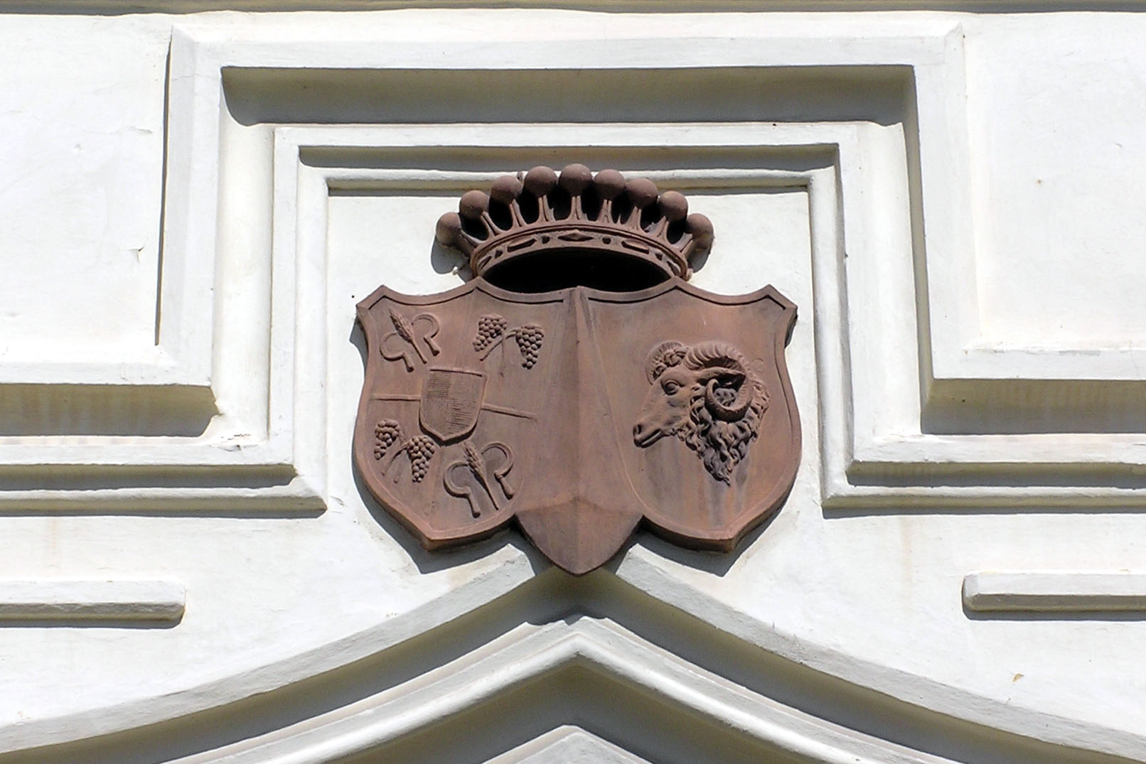 Zámek Nový Světlov - erb na portálu